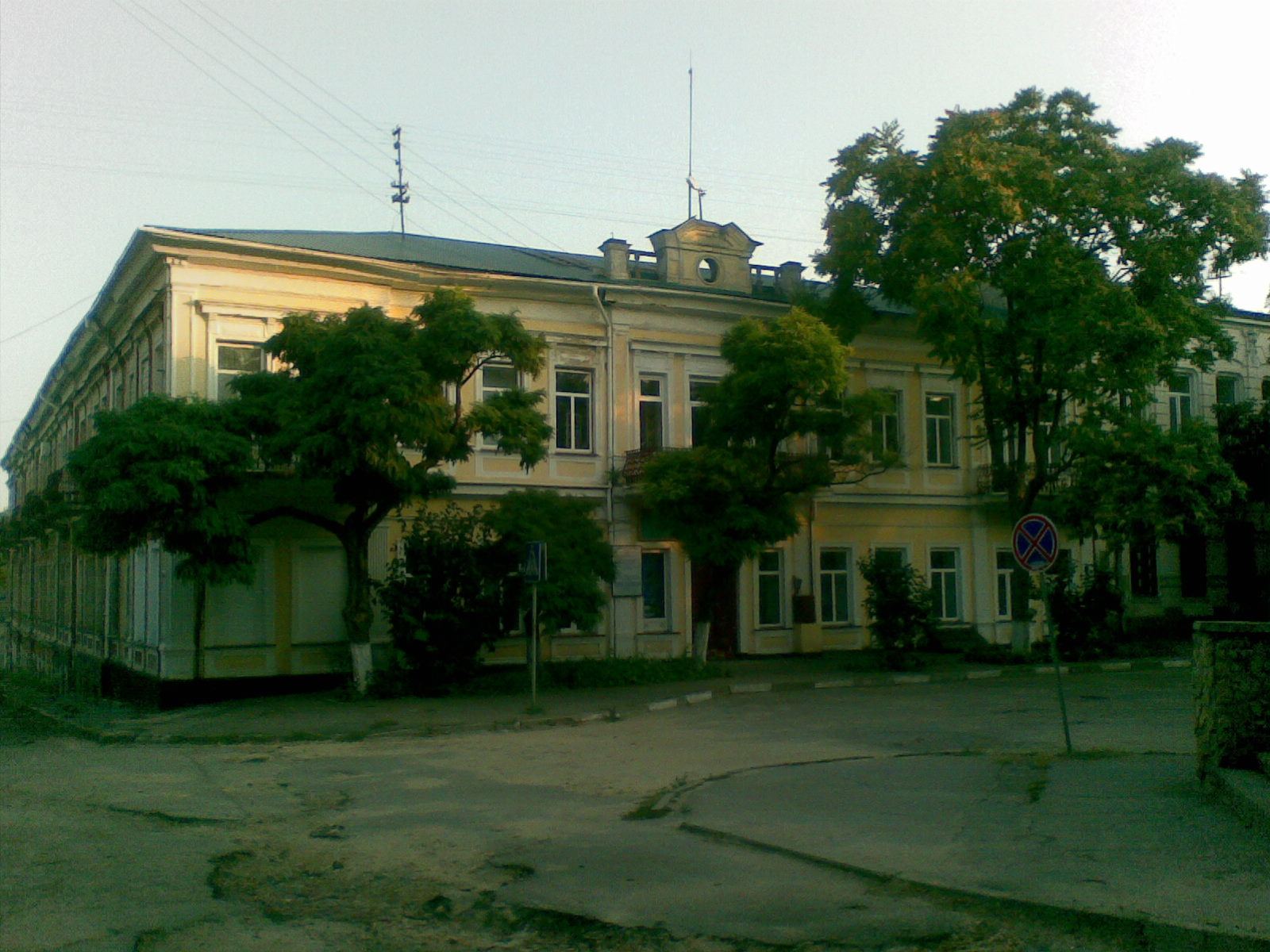 Shtab_anargistiv_Herson.jpg: Штаб анархістського руху у м. Херсон